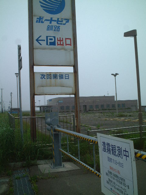 ボートピア釧路。（国道38号沿い）